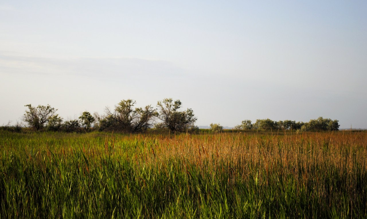 «Коса Федотова», Якимівський р-н, на захід від смт Кирилівка, півострів Азовського моря.